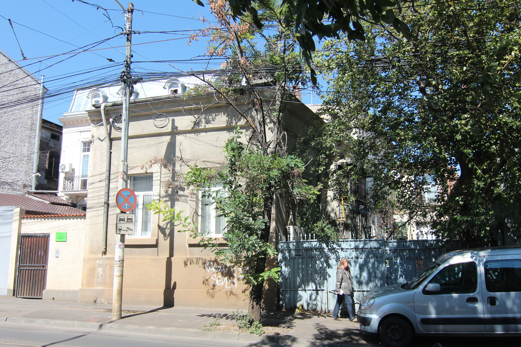 Casă pe Calea Că;ărașilor